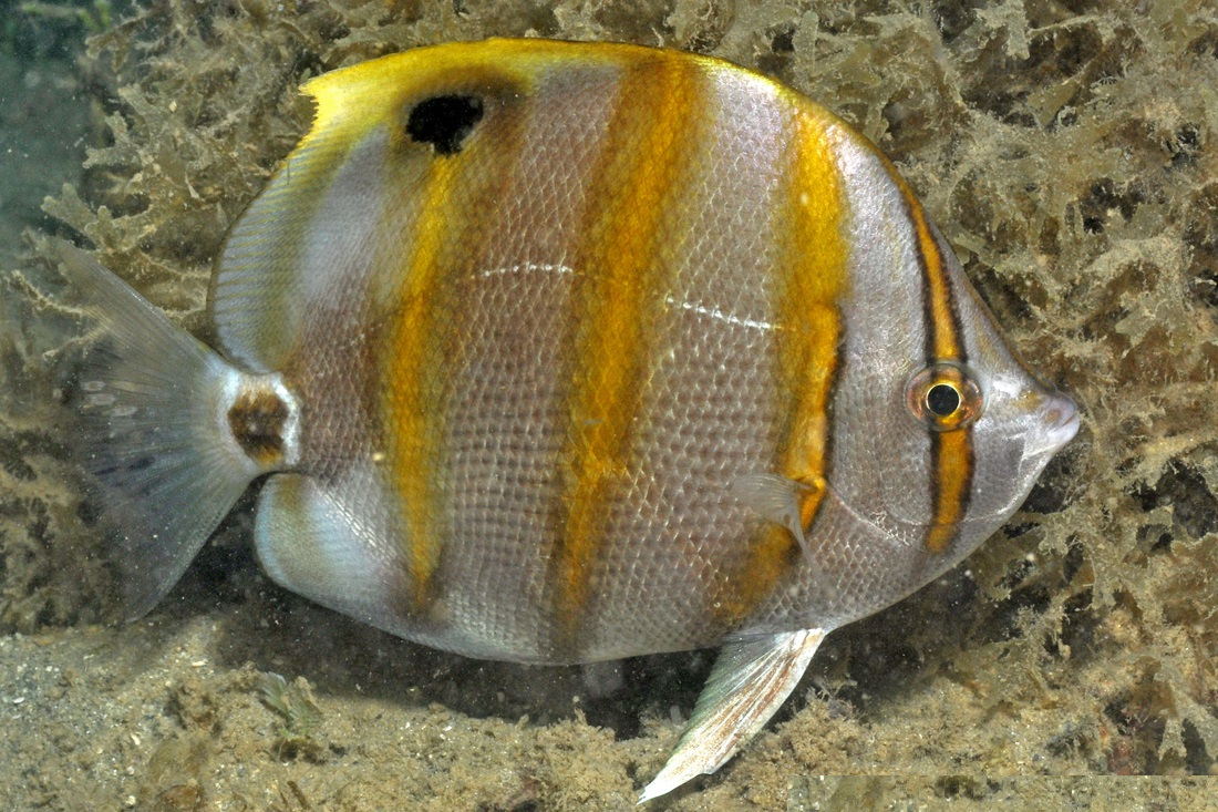 Parachaetodon ocellatus en el Parque Marino de Dampier, Australia